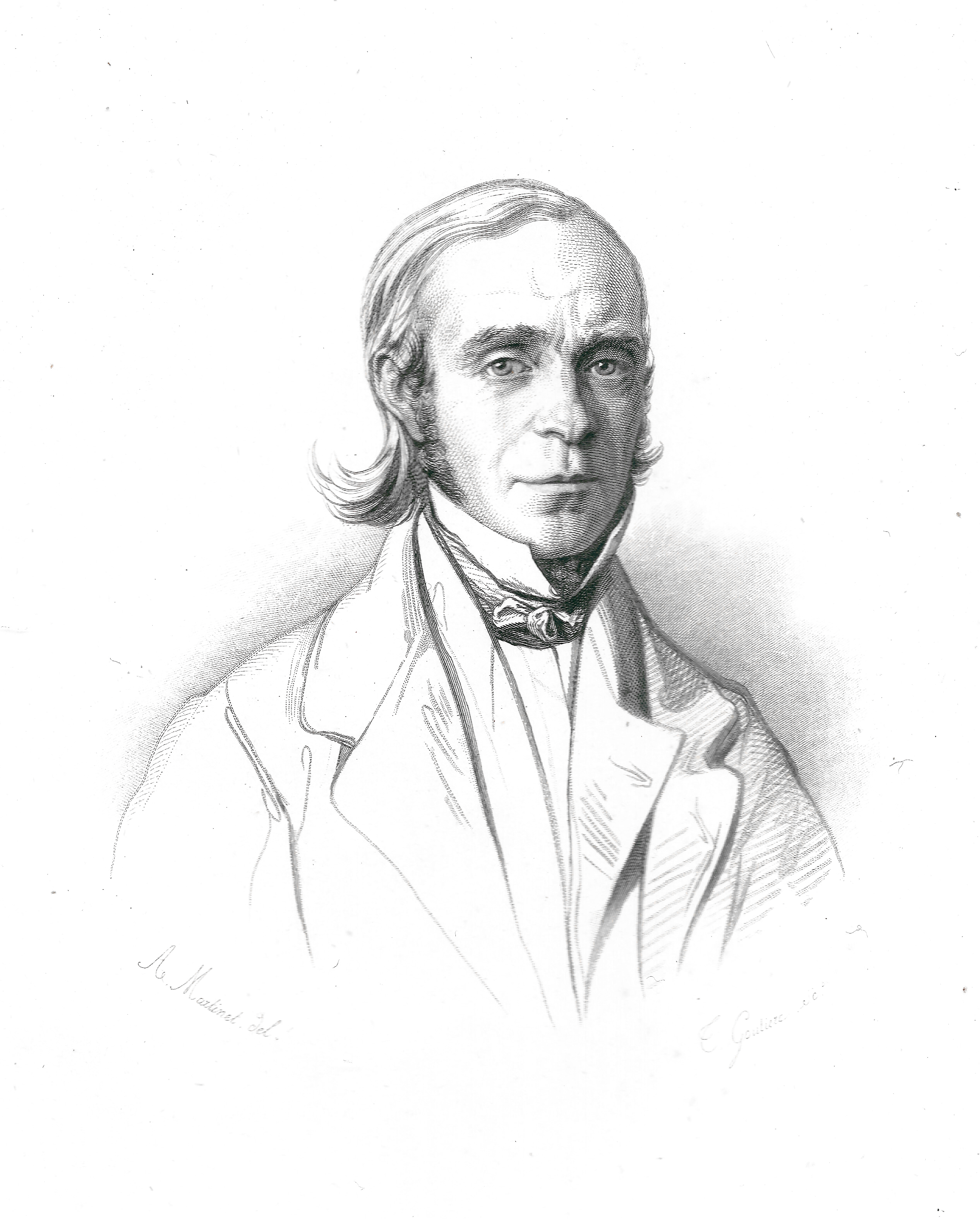 Portrait de Louis Antoine Garnier-Pages, en frontispice de son Histoire de la révolution de 1848 : 1- Europe : 1-Italie, Paris : chez Pagnerre, 1861